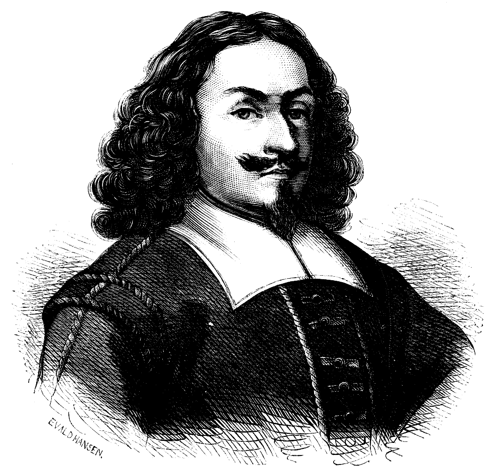 Johan Adler Salvius (1590 - 1652), friherre, riksråd och diplomat. Involverad i trettioåriga kriget